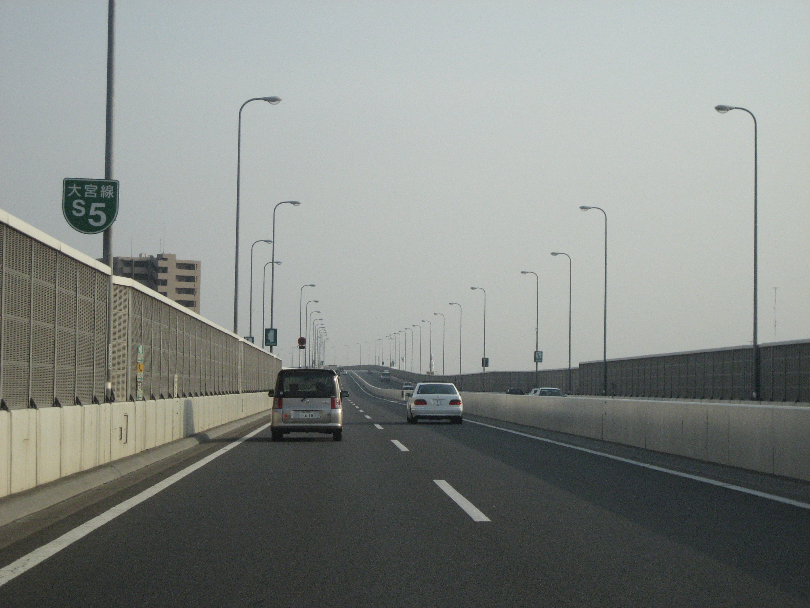 首都高速道路埼玉大宮線